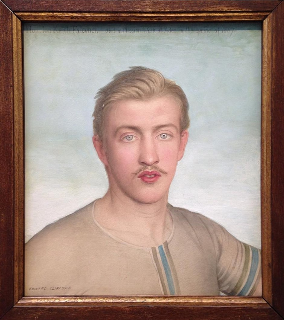 Ion Keith-Falconer (1856-1887), von Edward Clifford